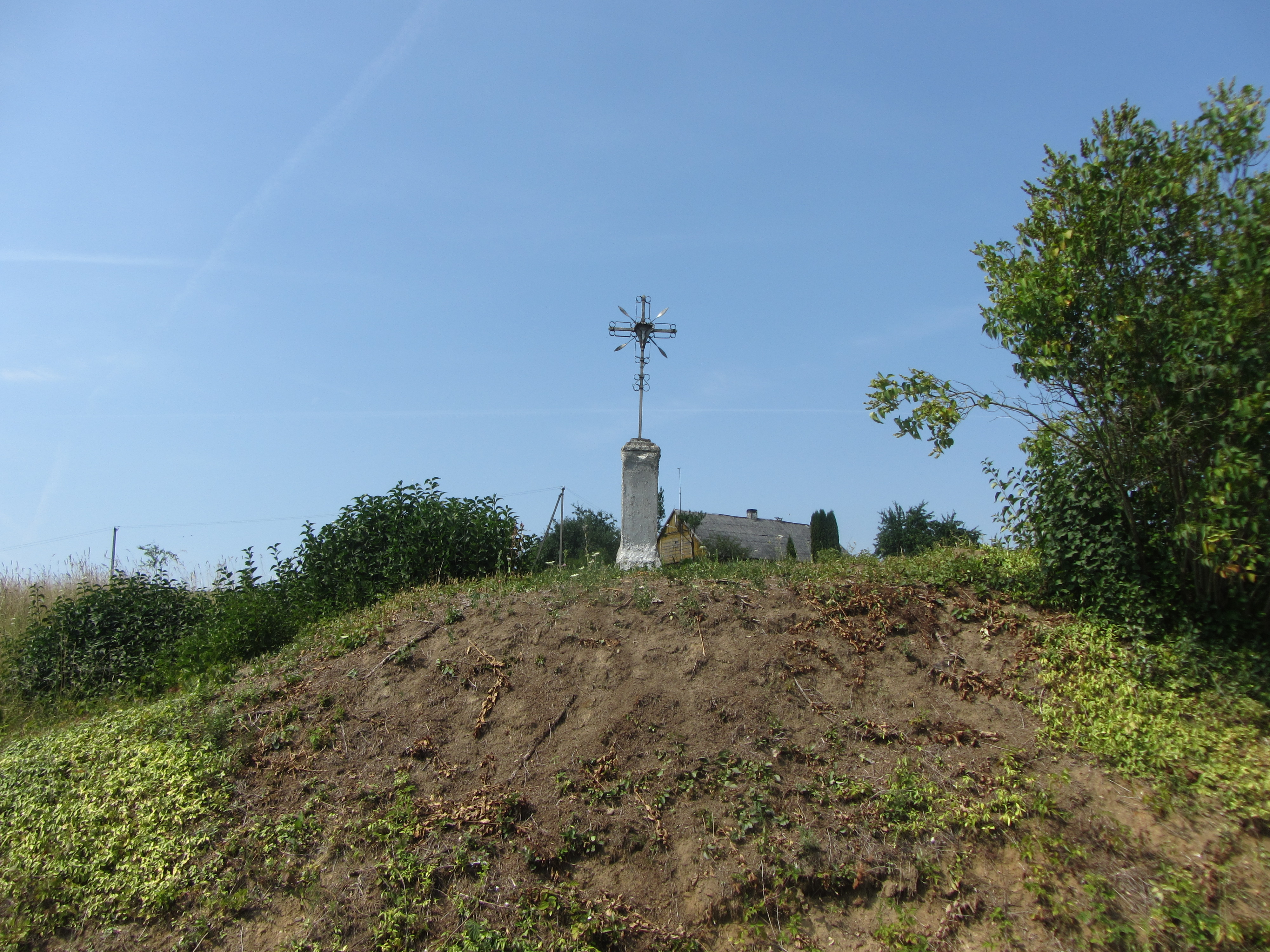 Veisiejų sen., Lithuania